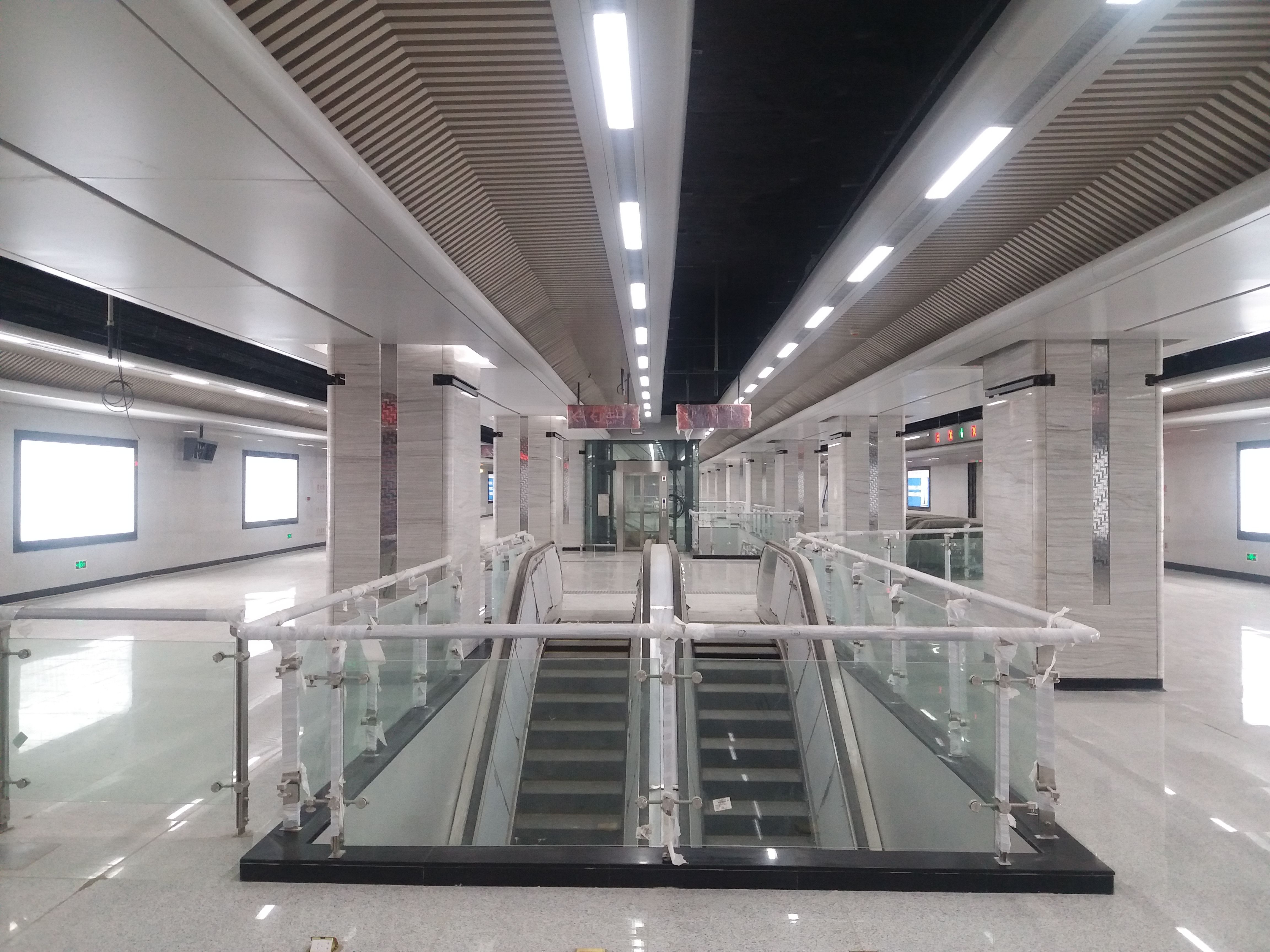 江城大道站站厅